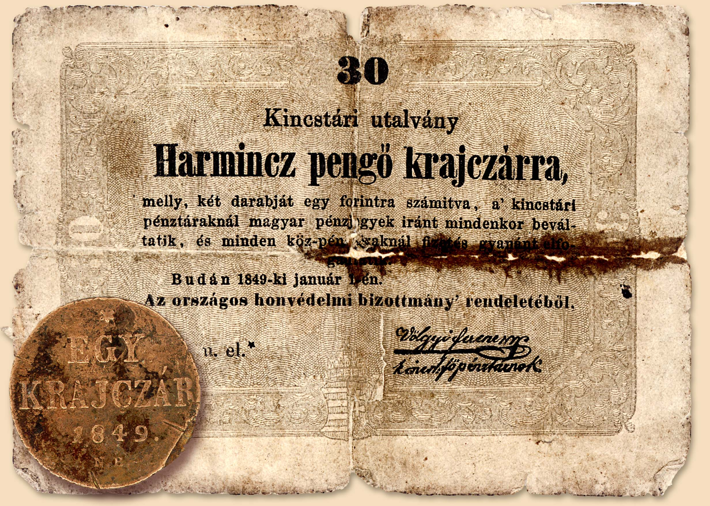 Kincstári utalvány harmincz pengő krajczárra. Az 1848–1849-es szabadságharc pénze. A krajcár Nagybányán készült, verdejele N.B.